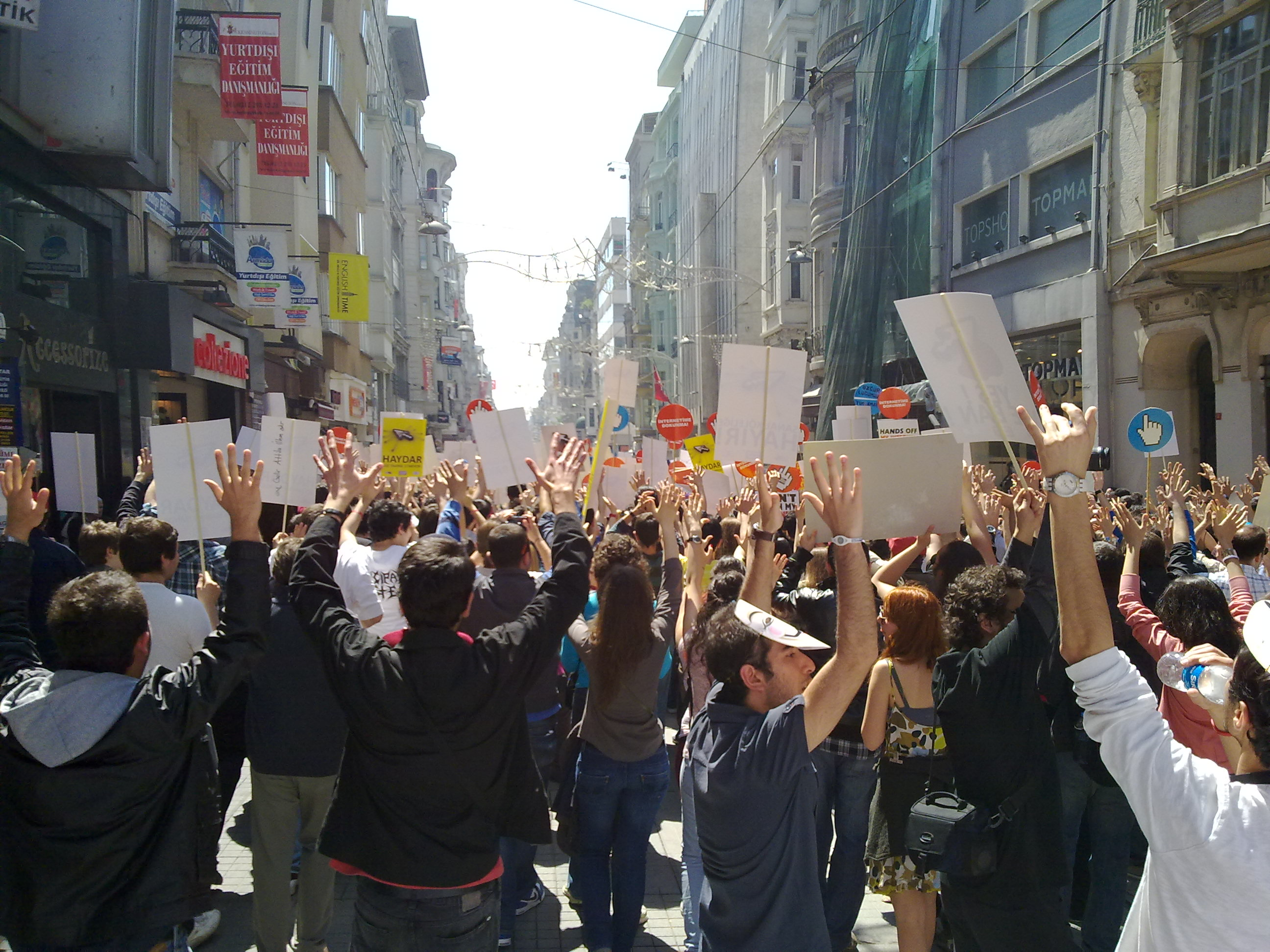 İstiklal Caddesi'ndeki "İnternetime Dokunma" yürüyüşü